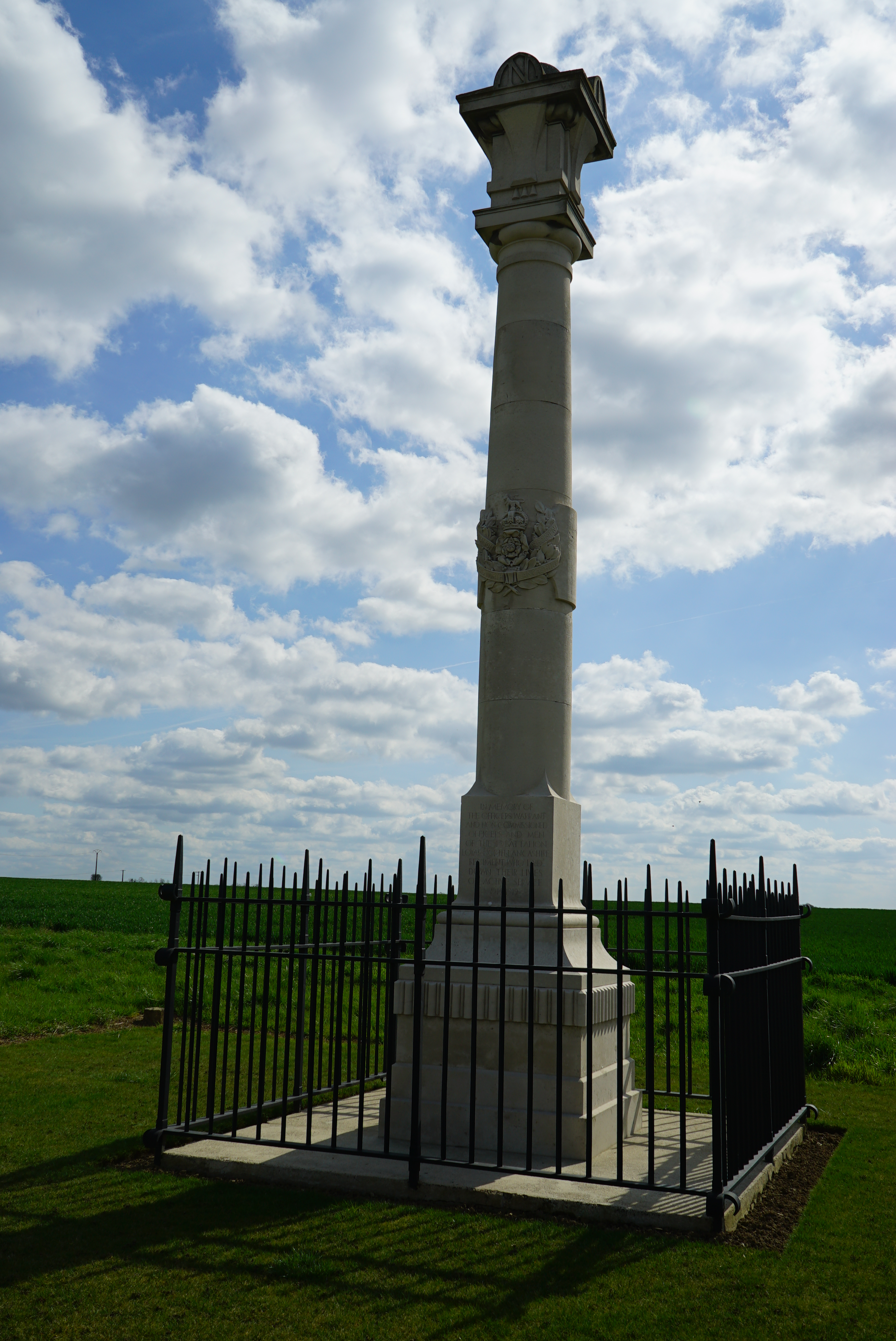 au village de Cerny-en-Laonnois, mémorial au premier battallion du Loyal North Lancashire.